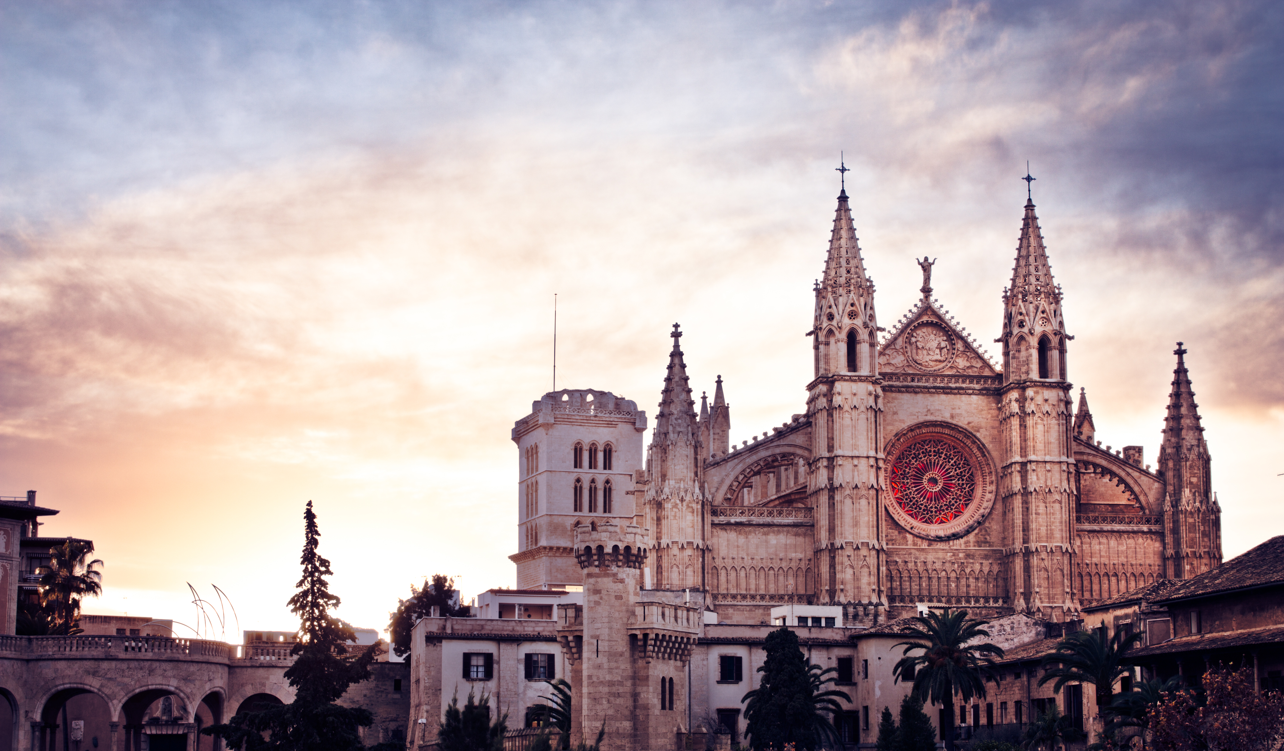 Cada año, en el solsticio de invierno (que este año es mañana día 21) el Sol del amanecer entra por el rosetón mayor (El ojo del gótico) de la catedral de Palma (la Seu) y sale por el otro extremo inundando de color el interior de la catedral. Aunque tenía que haber ido el Domingo a hacer esta foto, gracias a mi amigo Miguel y las espectaculares vistas de su casa he podido hacerla hoy :D